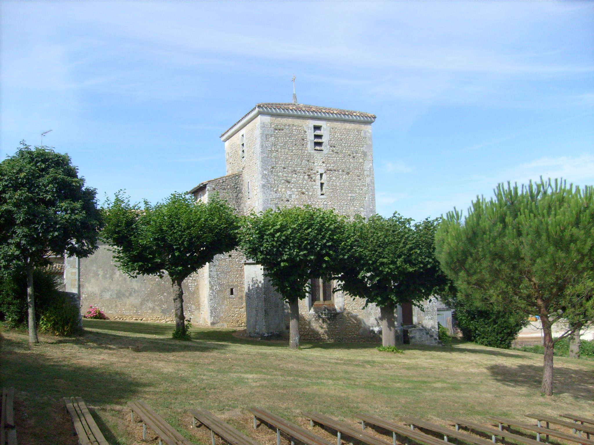 L'église Saint-Saturnin de Saint-Sorlin de Cônac